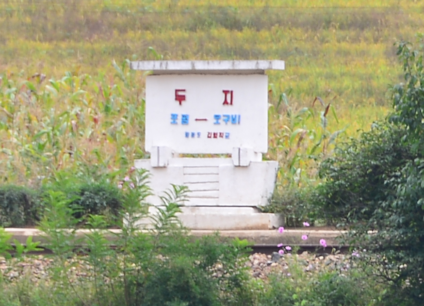 巡道工出品 photo by Xundaogong 杜芝駅 두지역 Tuji